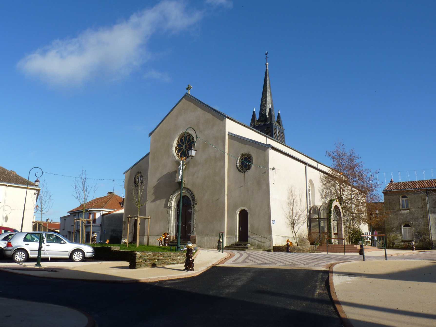 Andrezé Photo de l'eglise